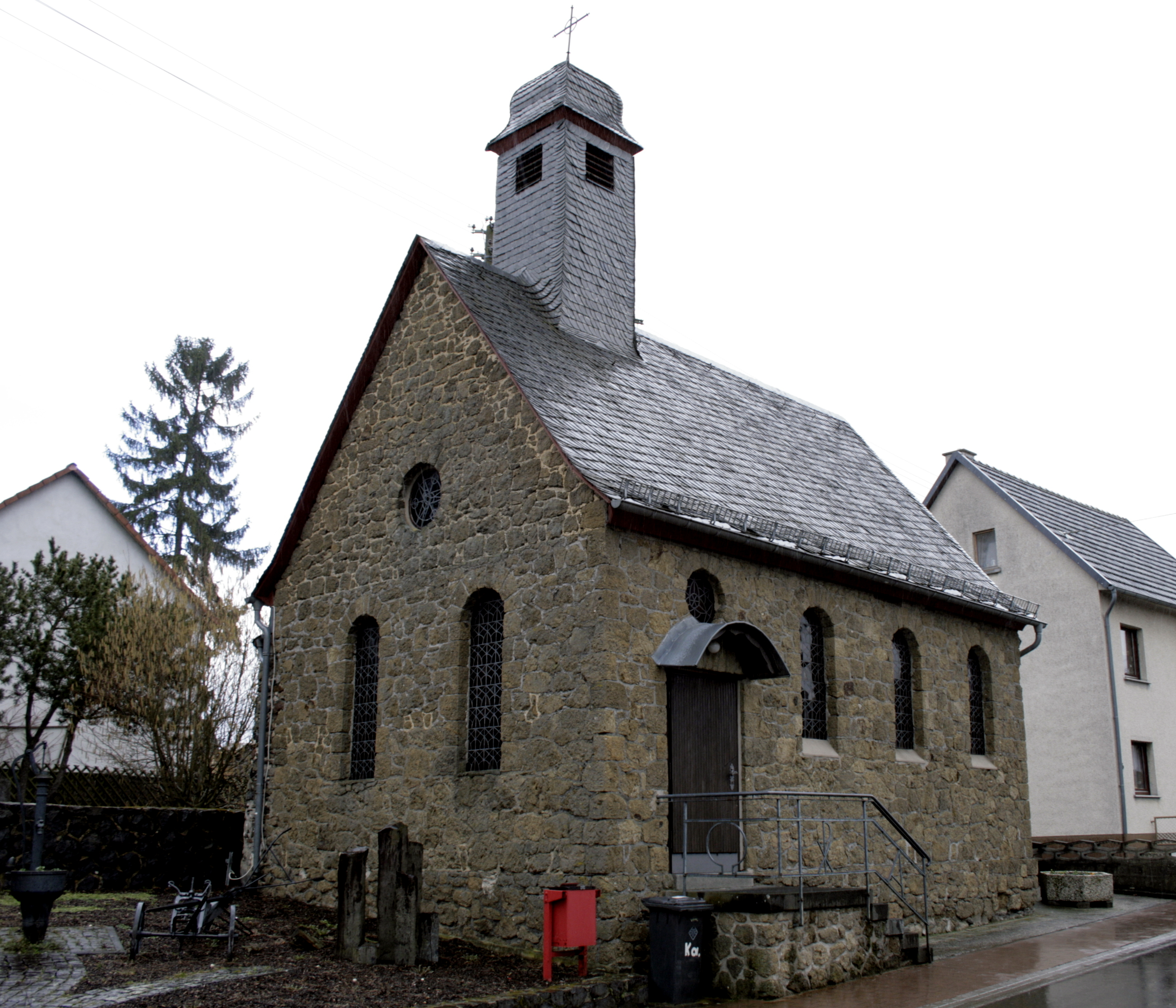 Kapelle in Heuchelheim, Deutschland